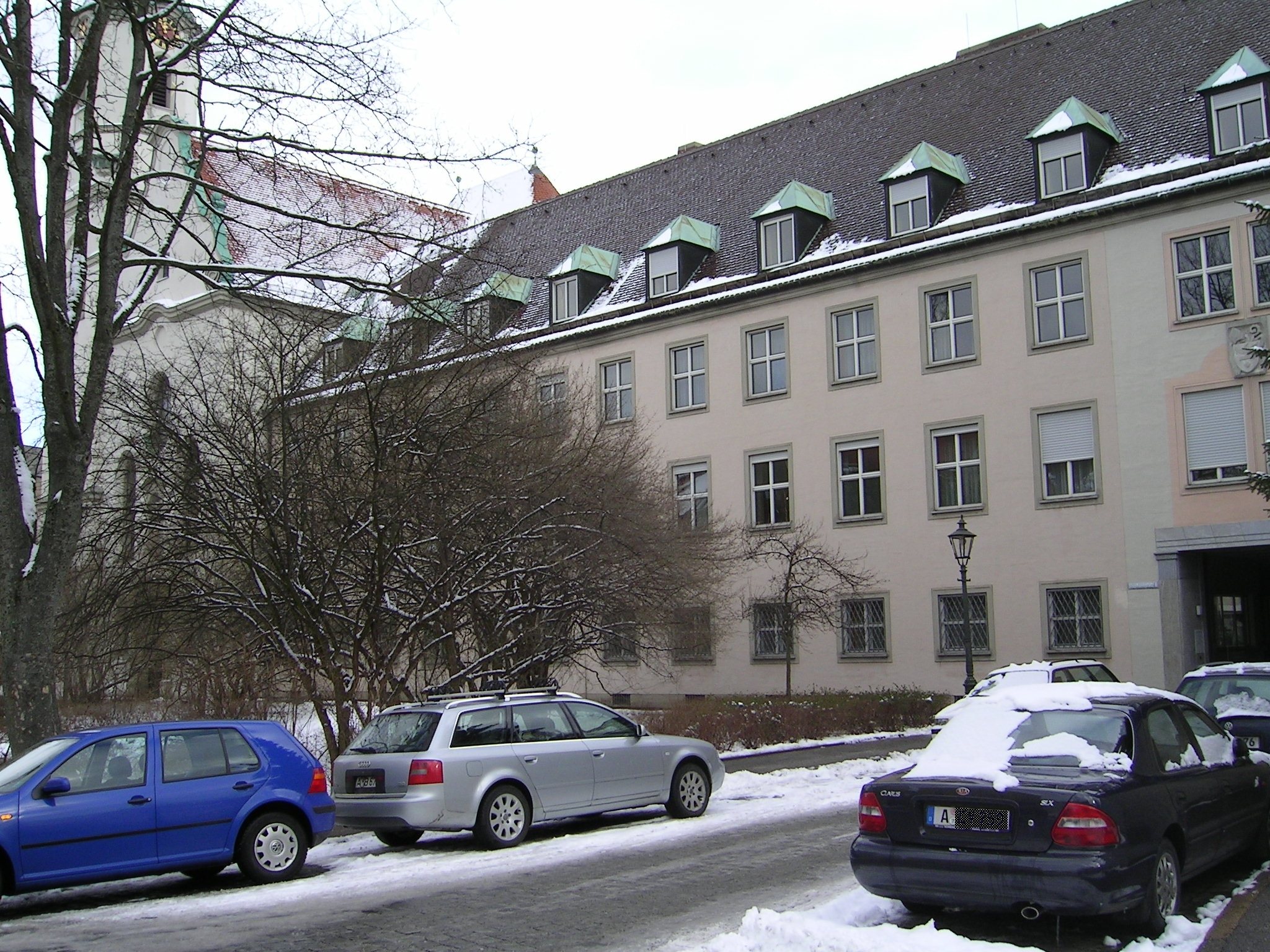 Ansicht von Kirche und Kloster St. Stephan (Augsburg) im Winter